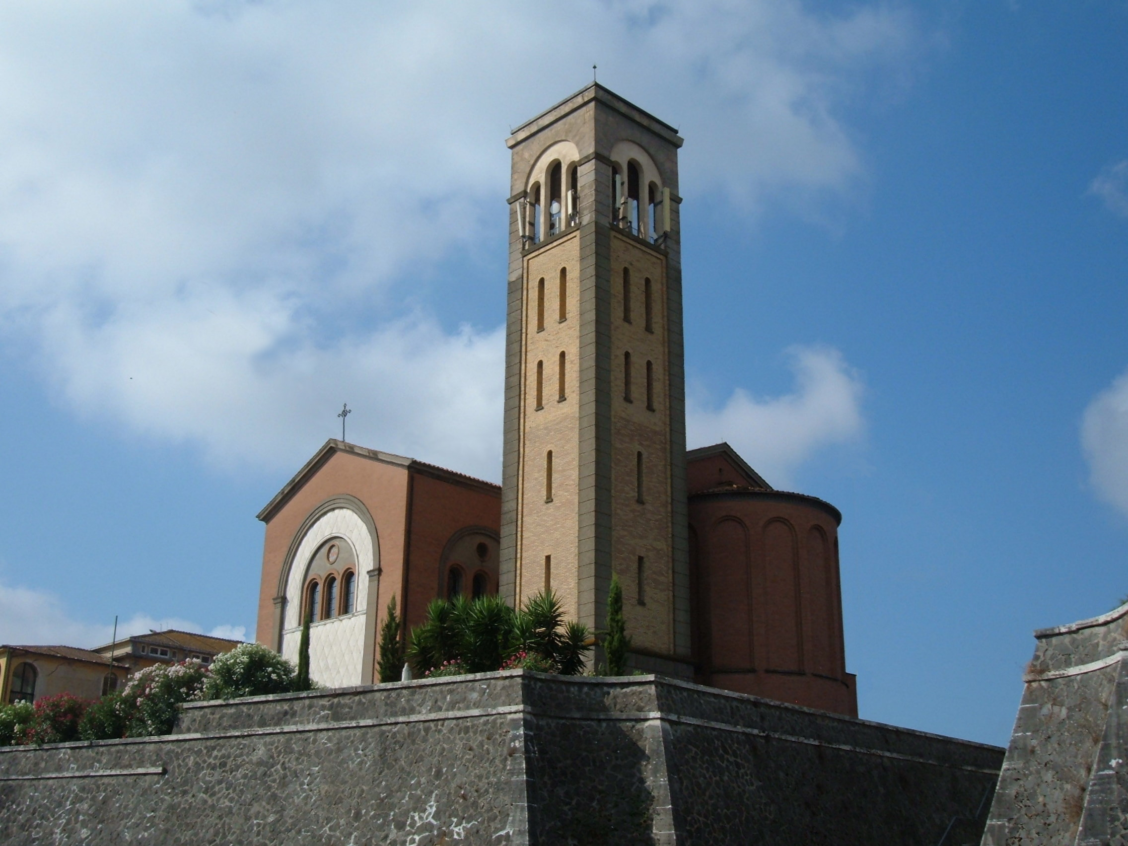 Cattedrale dei Sacri Cuori di Gesù e Maria, a Roma, in zona La Storta, sulla via Cassia. Chiesa cattedrale della diocesi suburbicaria di Porto-Santa Rufina.